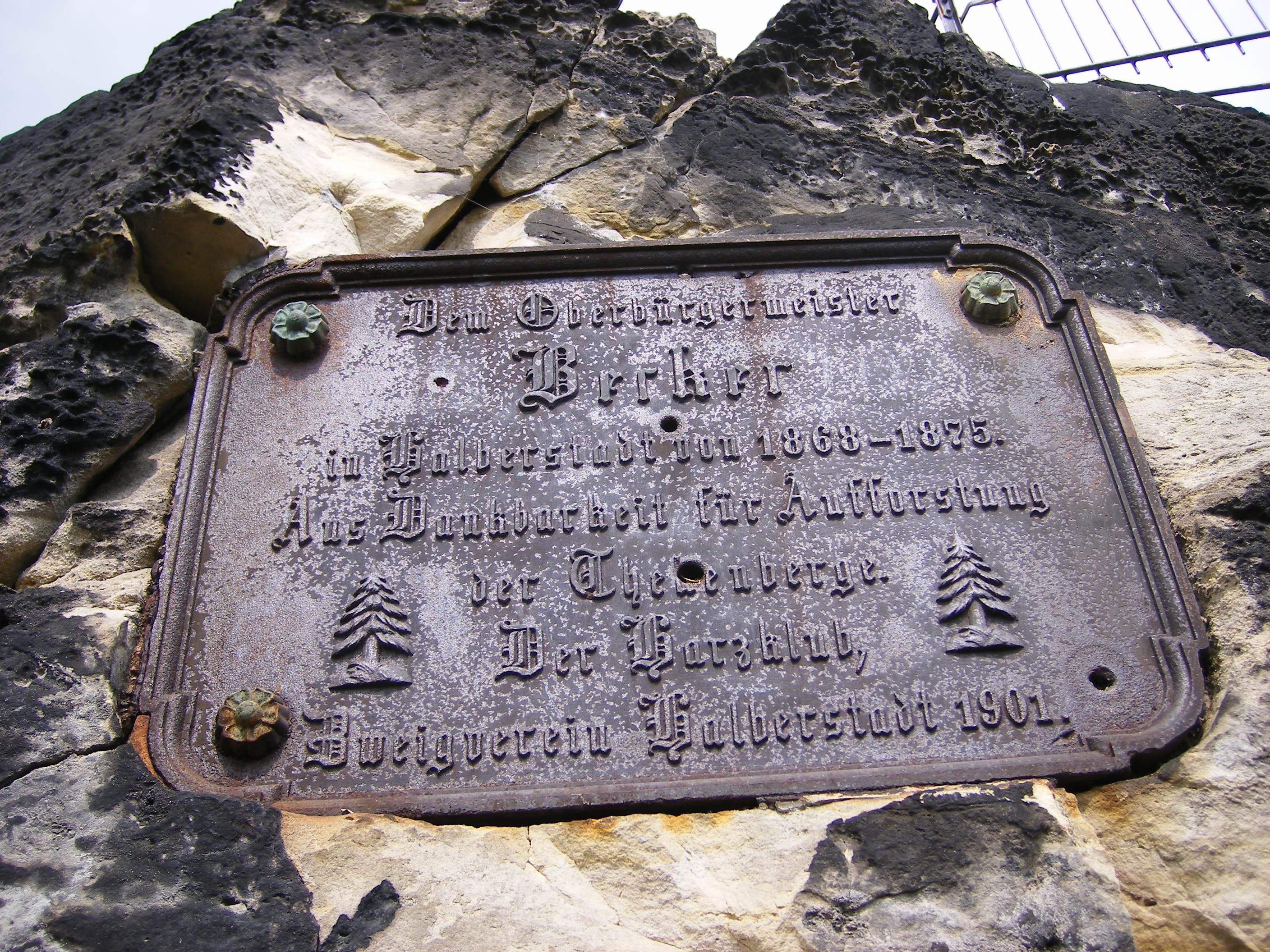 Plakette am Aussichtsfelsen